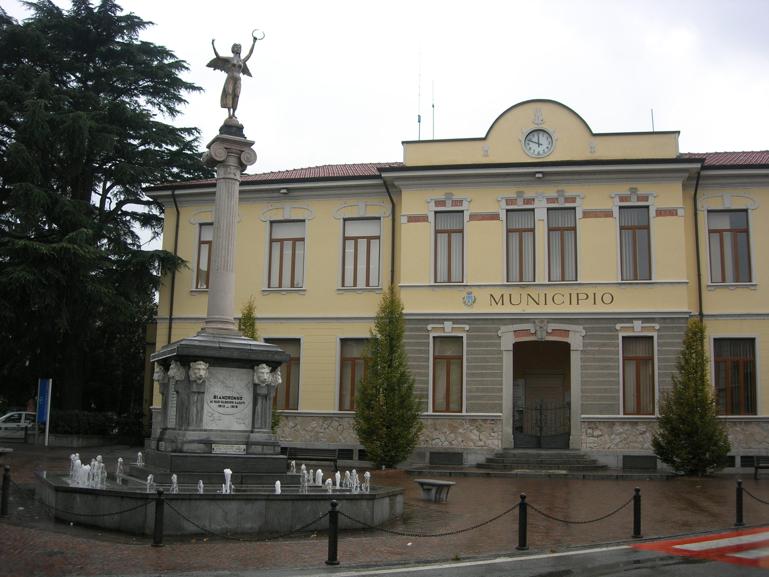 Il municipio di Biandronno